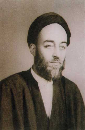 Allameh Tabatabaei in youth-tabatabaee-tabatabai-mohamad hosin tabatabaee-mohamadhosein tabatabaee-mohammadhosein tabatabaee-mohammadhosein tabatabai-tabatabaey-mohamadhosein tabatabaey-mohamad hosein tabatabaey-mohammad hosein tabatabaey-mohammadhosein tabatabaey